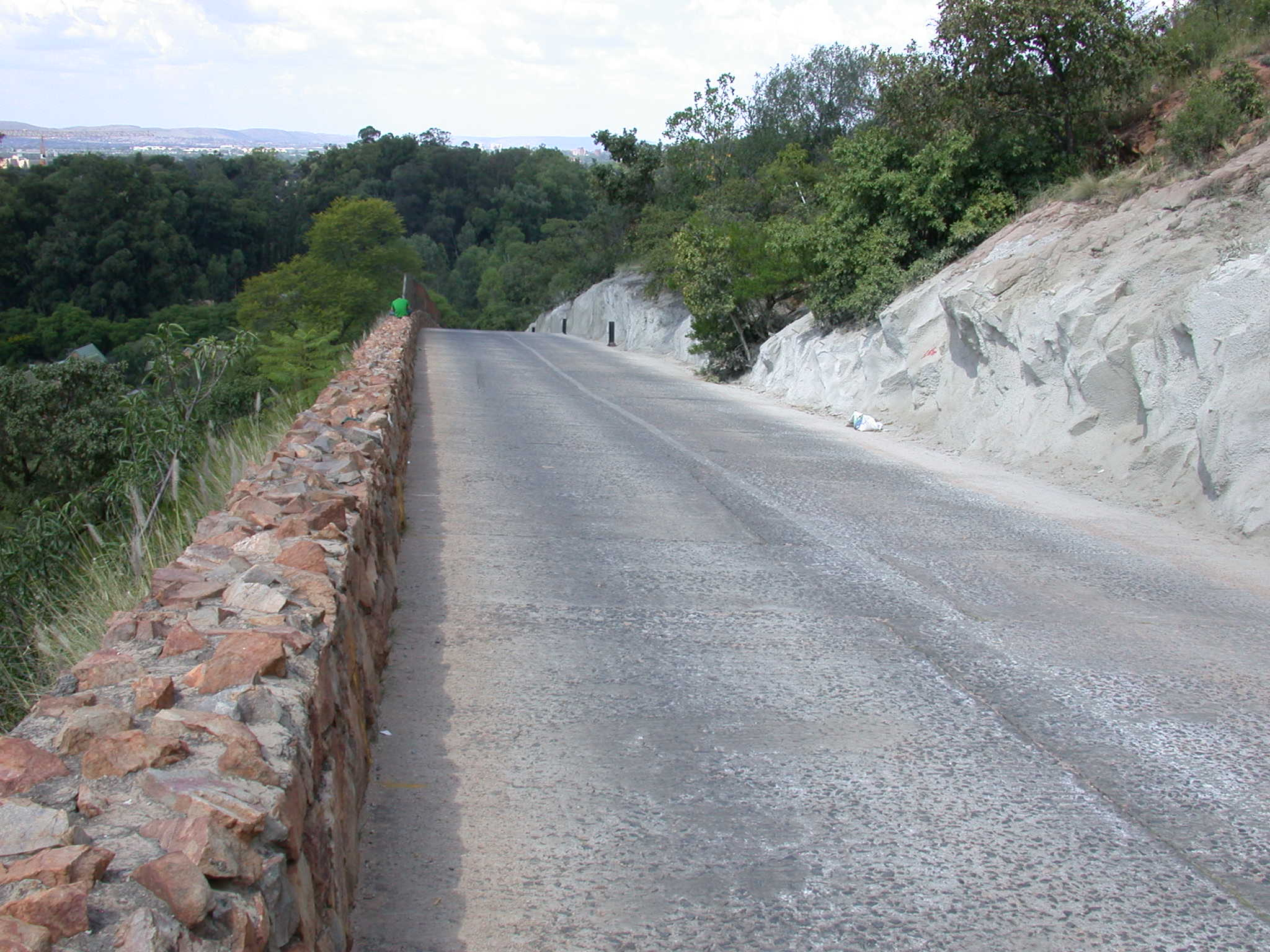 Tom Jenkins drive in Pretoria